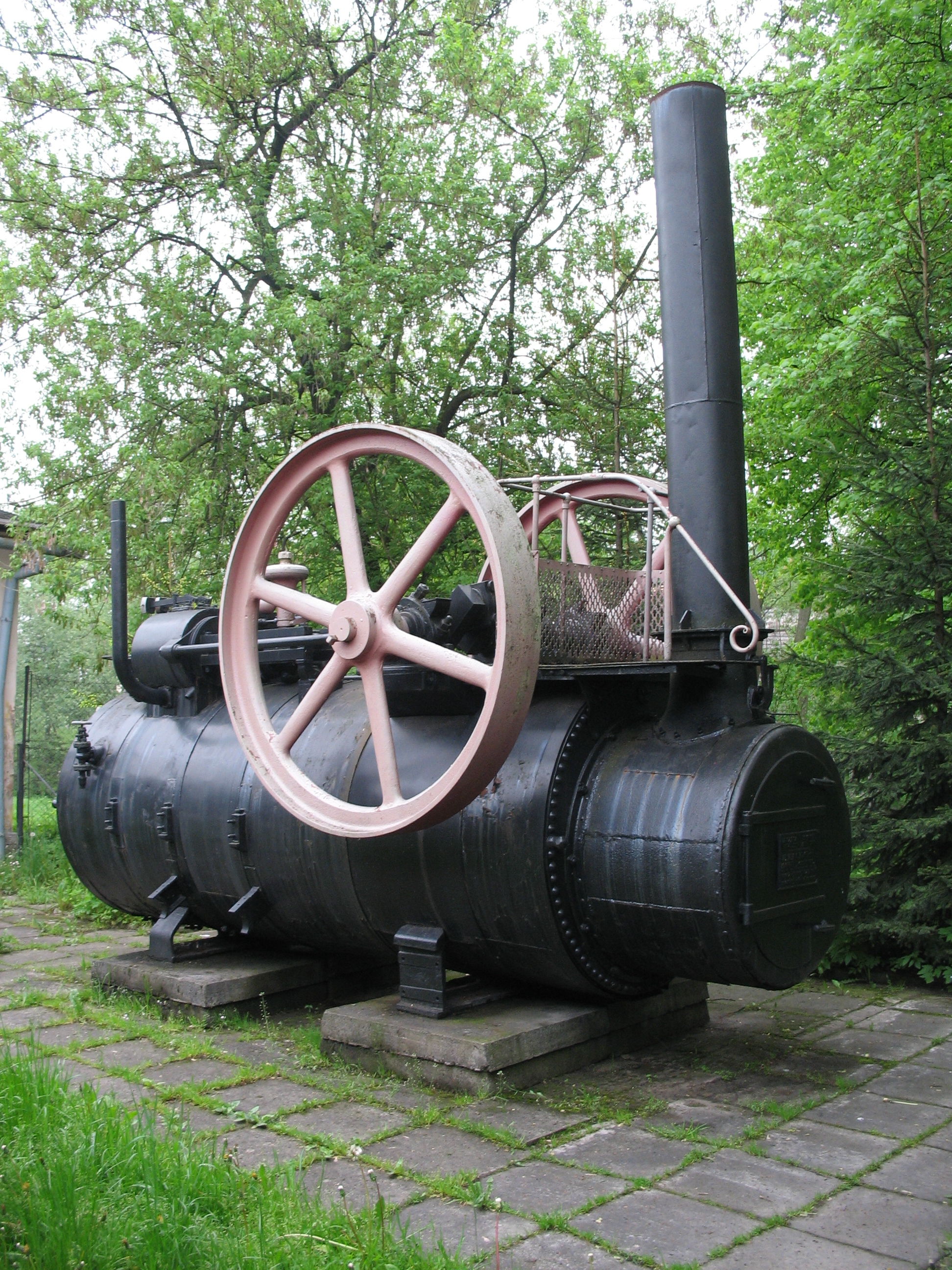 Lokombila stała. Eksponat skansenu taboru kolejowego w Chabówce